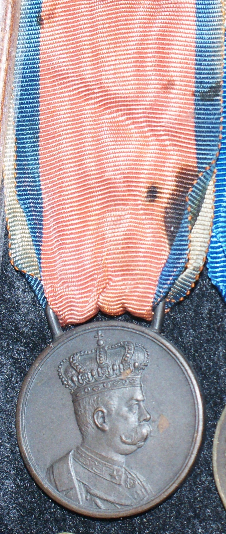 Medaglia commemorativa delle Campagne d'Africa. Collezione privata